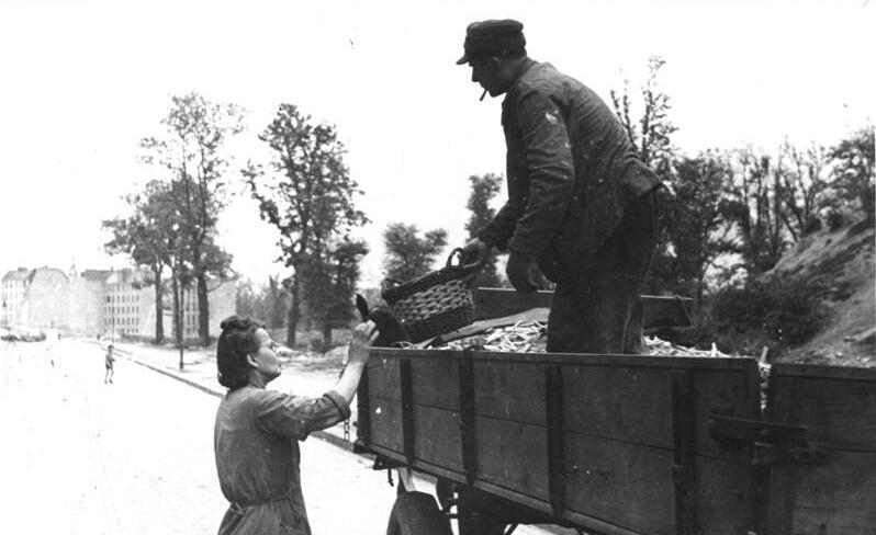 ADN-ZB/Illus-Vitanova Berlin, um 1947 Hier gibt es Brennholz für Kartoffelschalen. 5222-50